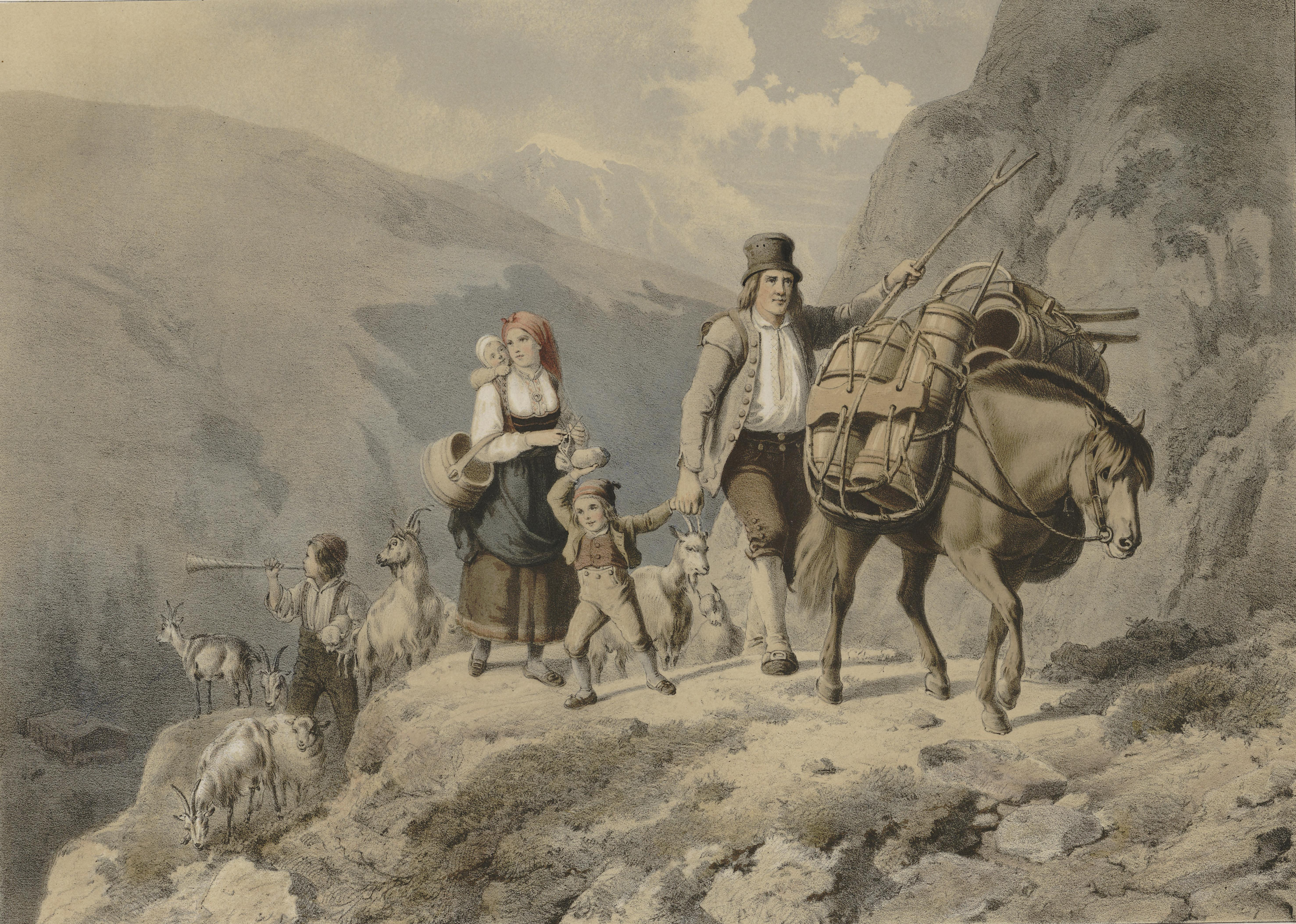 Illustrasjon hentet fra boken Norske Folkelivsbilleder av Tidemand, Adolph og utgitt av Chr. Tønsberg (Christiania, 1854)